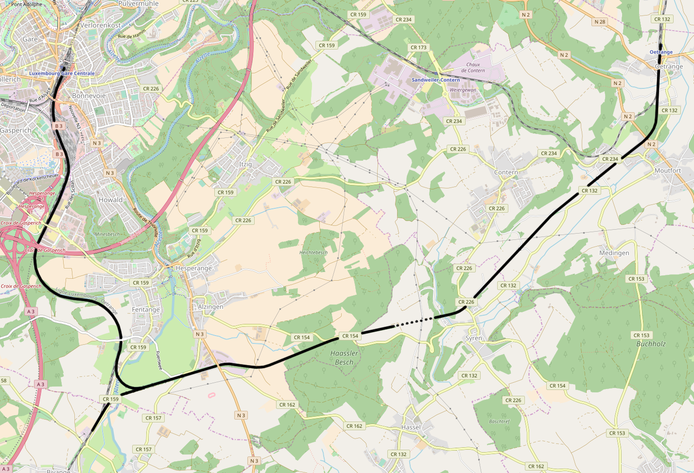 CFL line 4, Luxembourg - Oetrange